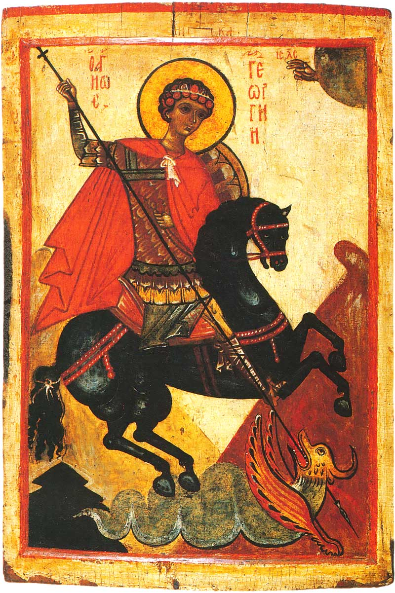 Чудо св. Георгия о змие. Середина XIV в. Новгород. ГТГ, Москва